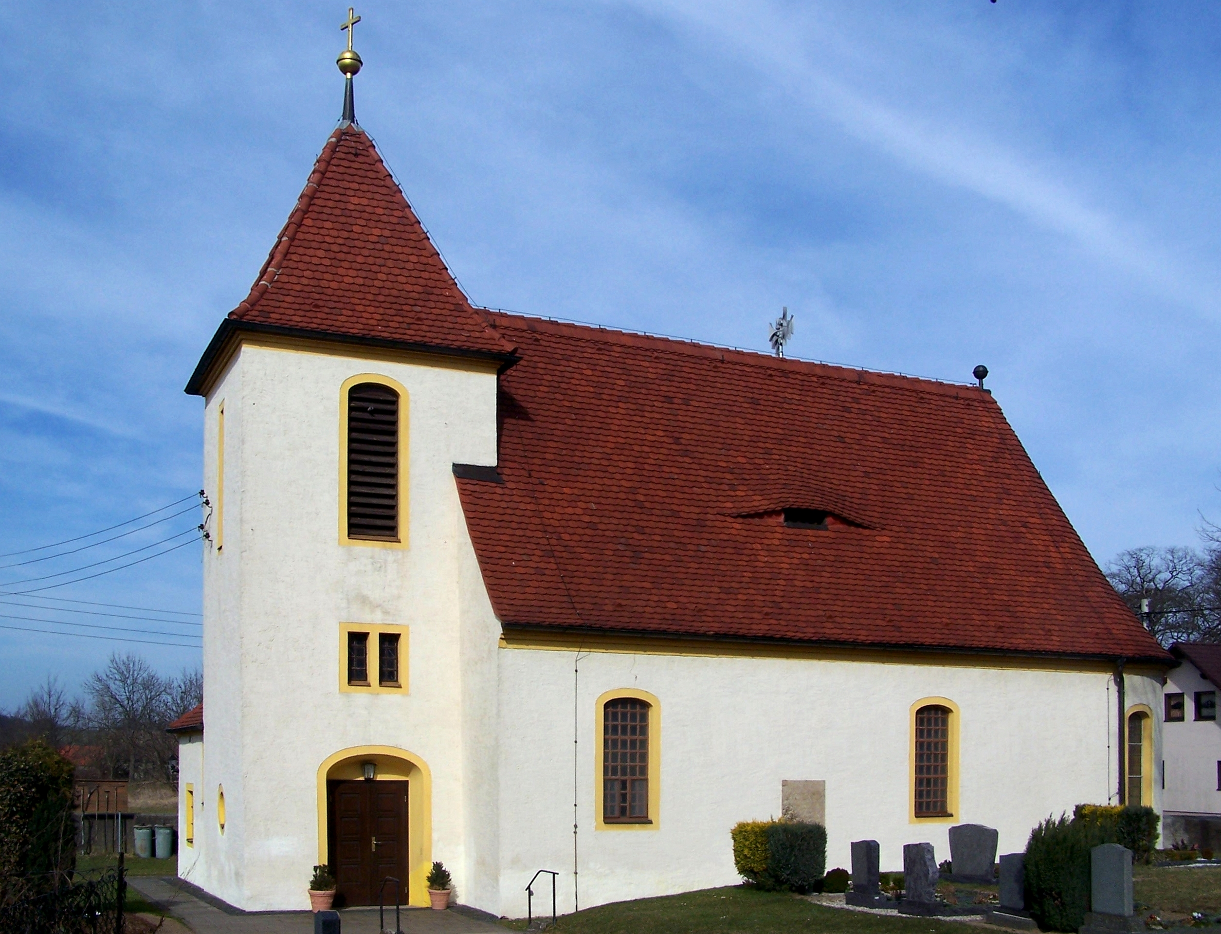 Kirche Zschaiten, Gemeinde Nünchritz, Landkreis Meißen